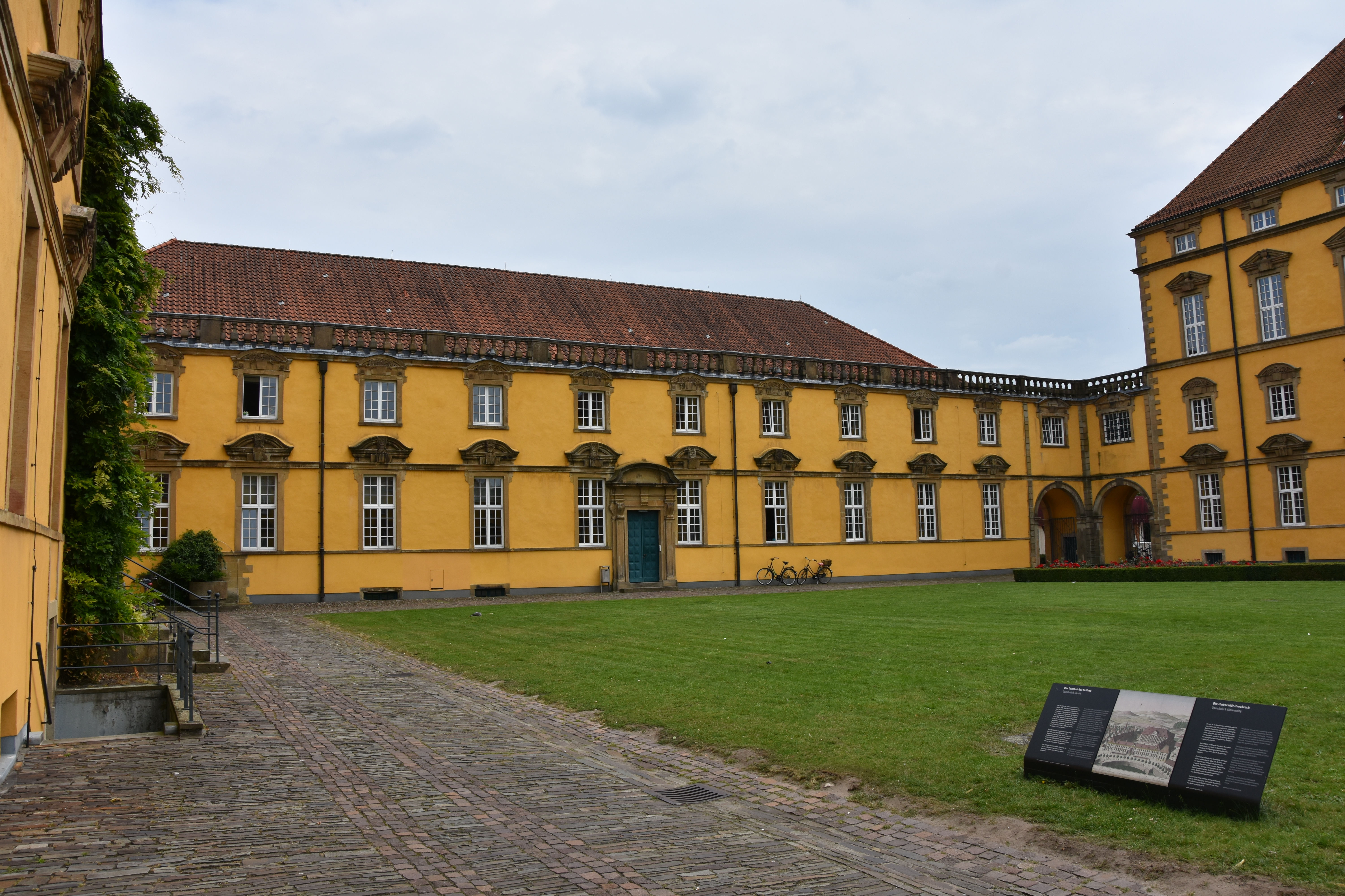 Gebäude lInker Flügel Schloss Osnabrück